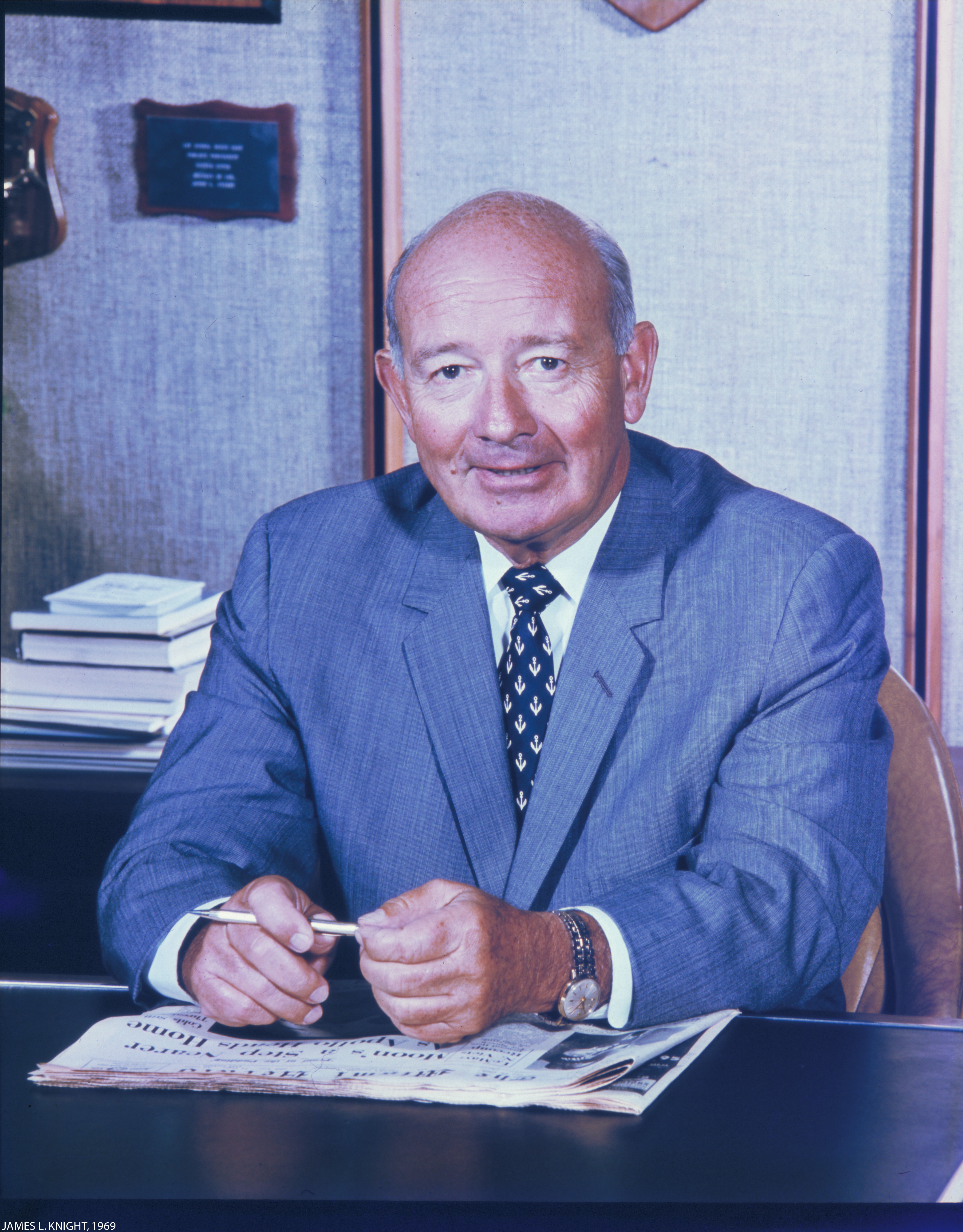 James_L_Knight_portrait